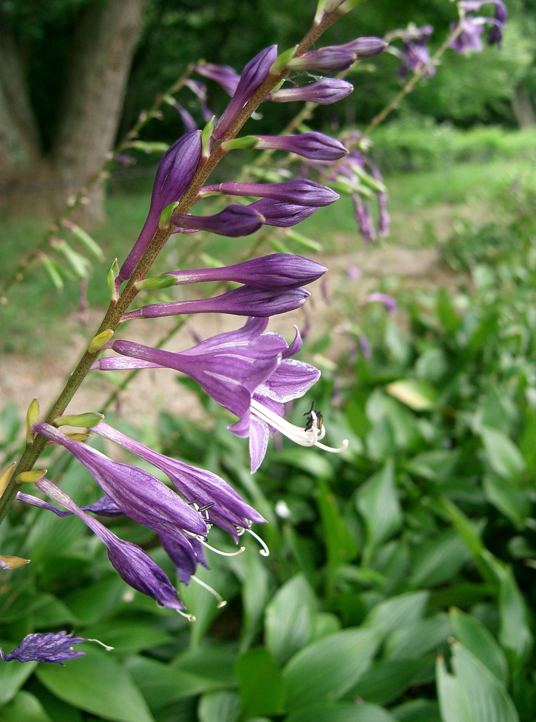 Scientific name Hosta longipes